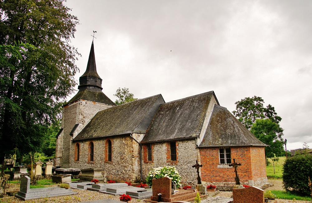 église St Paul